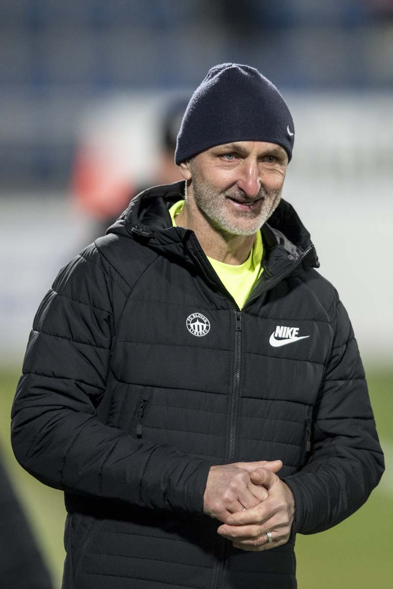 Pavel Medynský (2020)